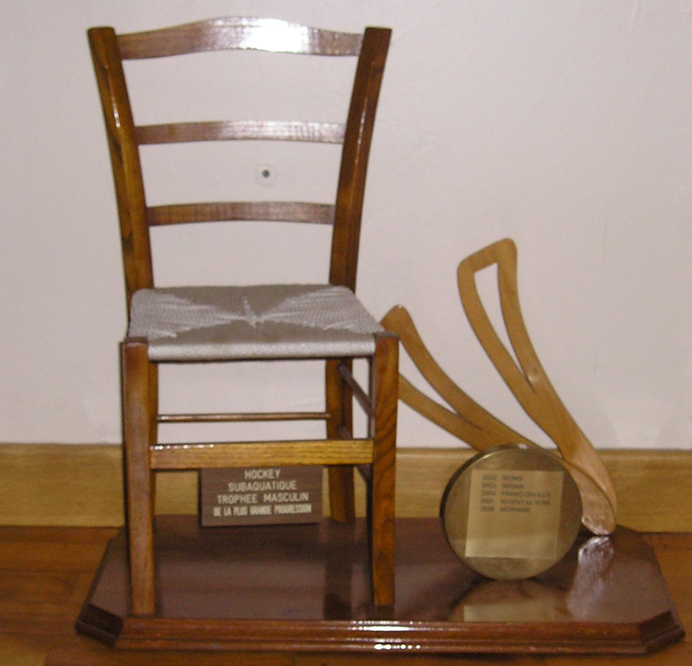 "trophée de hockey subaquatique: "La chaise" creé par Phillipe Pipet , joueur de l'équipe de hockey de Nantes